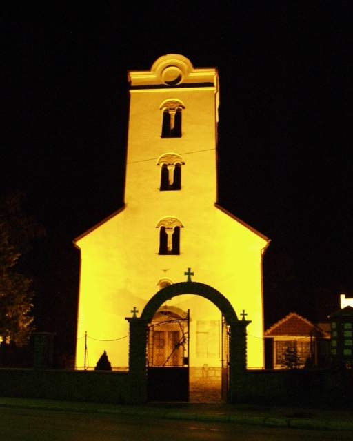 Ivanjica crkva nocu